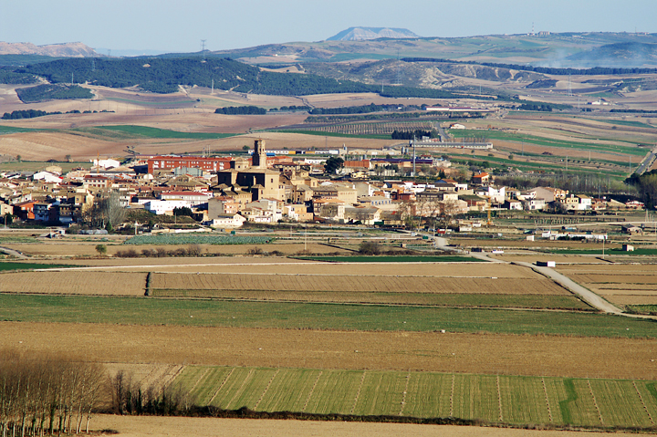 Villafranca Peñalendik - Villafranca desde el barranco de Peñalén.